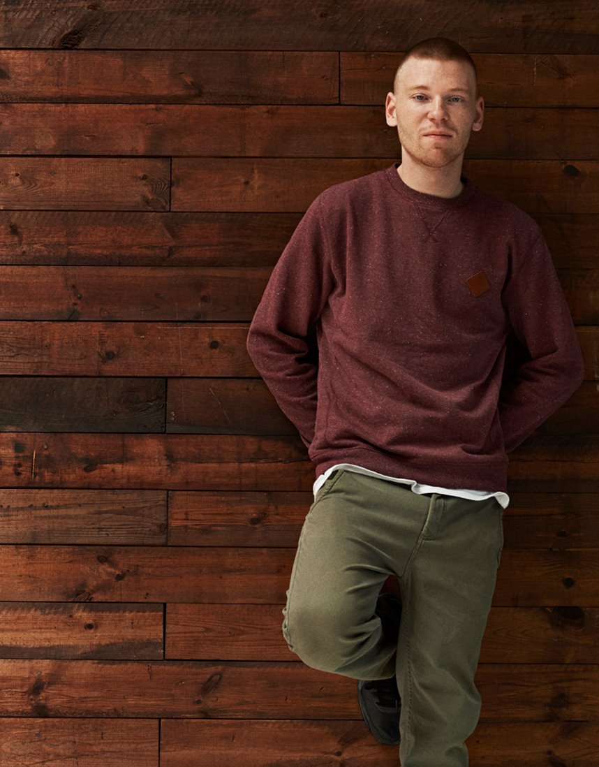 Foto: Ulf Svane